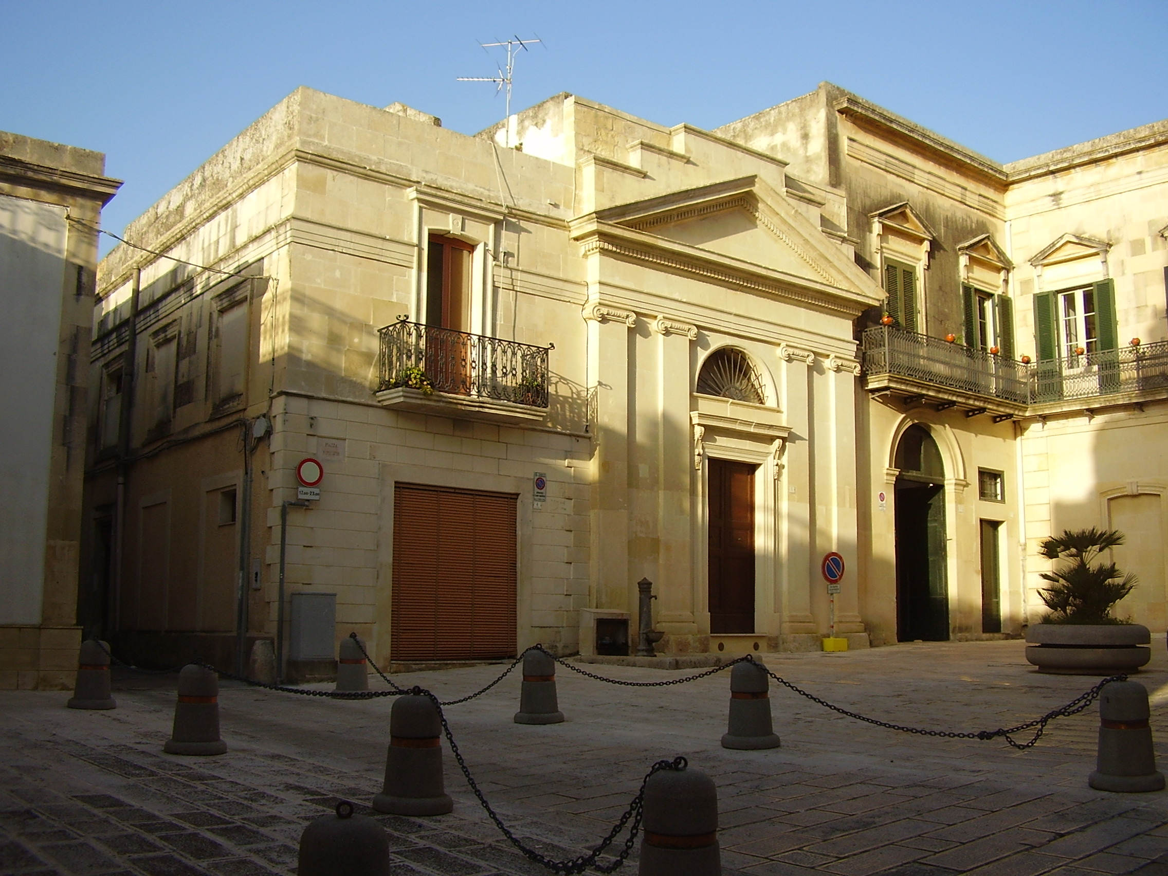 Piazza Municipio Scorrano, Lecce